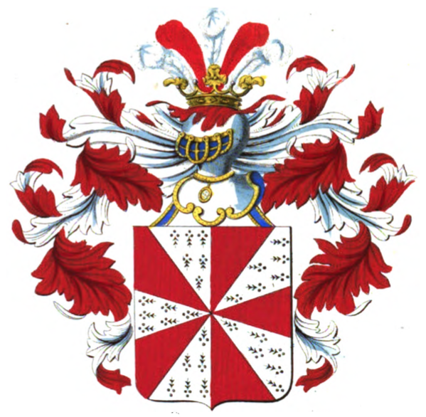 Armoiries de la famille Baudier